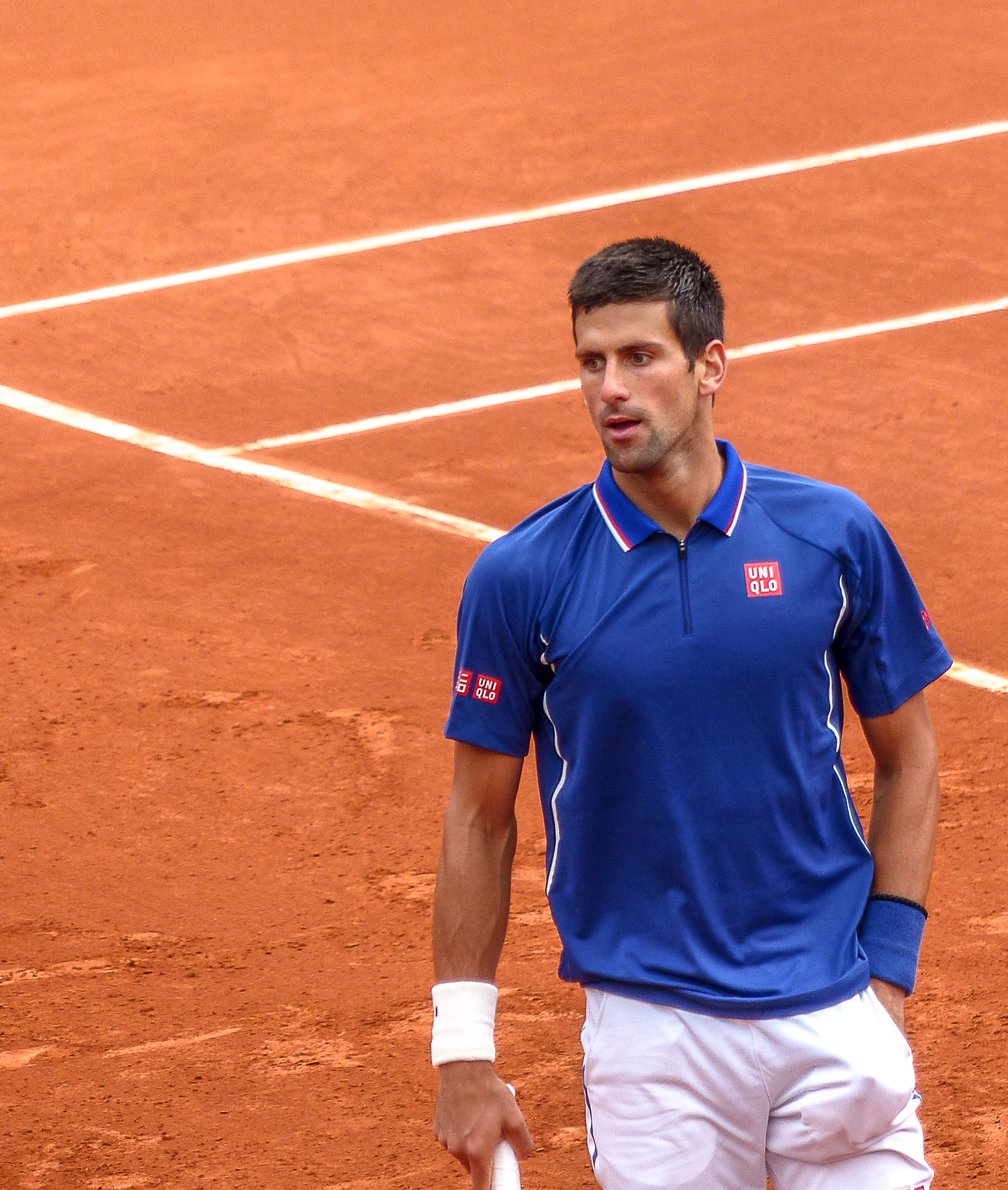 2ème tour Roland Garros 2013 : Novak Djokovic (SRB) def. Guido Pella (ARG)